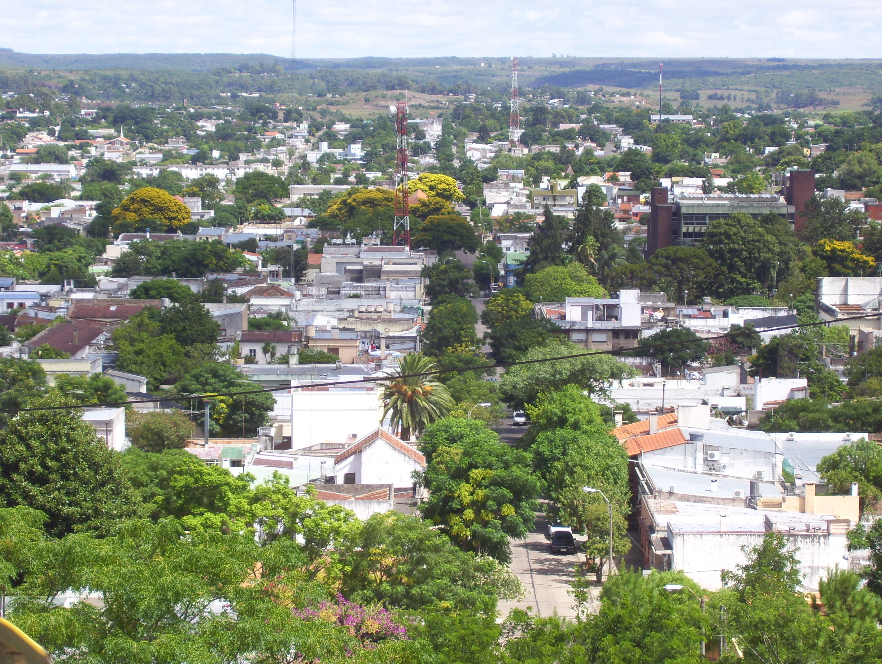 Vista de la ciudad de Rivera desde el Cerro Marconi, hacia el noroeste (calle Artigas)